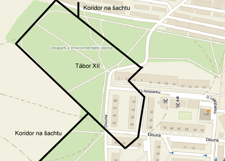 Výřez zeměpisné mapy zachycující západní okraj města Horní Slavkov. Vyznačena je přibližná poloha bývalého pracovního tábora XII.